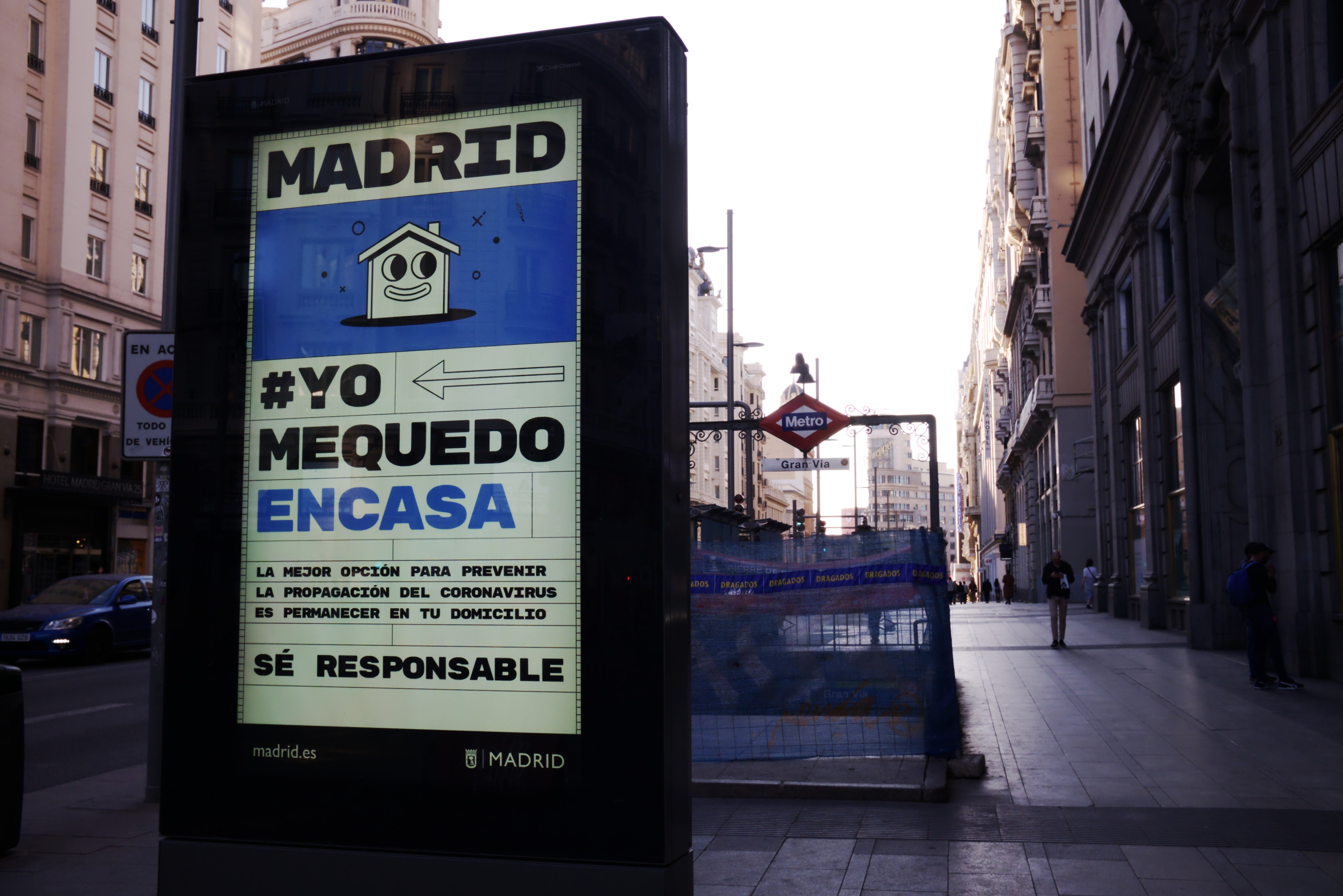 Madrid, el 14 de marzo de 2020